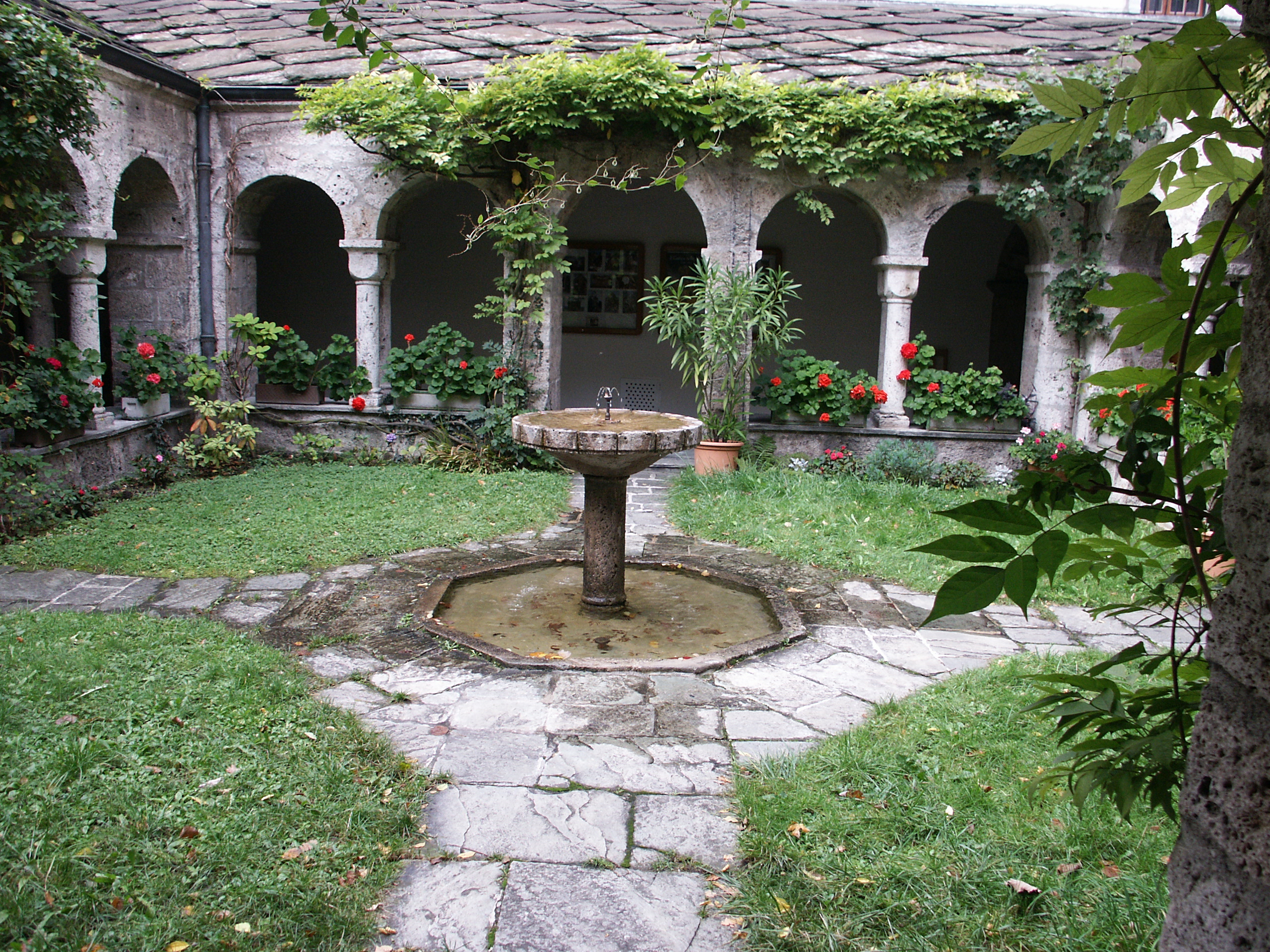 St-Maurice